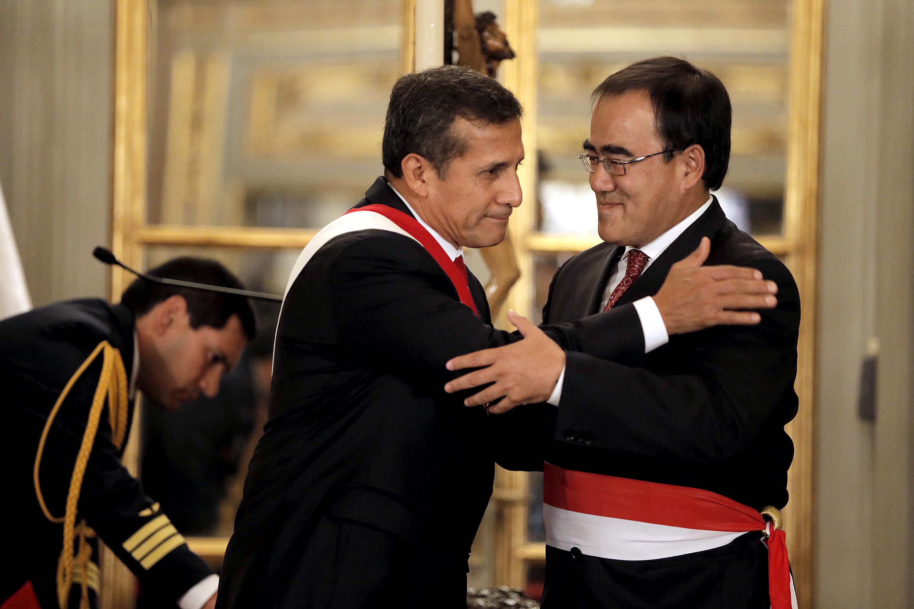 José Gallardo Ku, Ministro de Transportes y Comunicaciones del Perú, en la ceremonia de juramentación del Gabinete Cateriano, el 2 de abril de 2015.